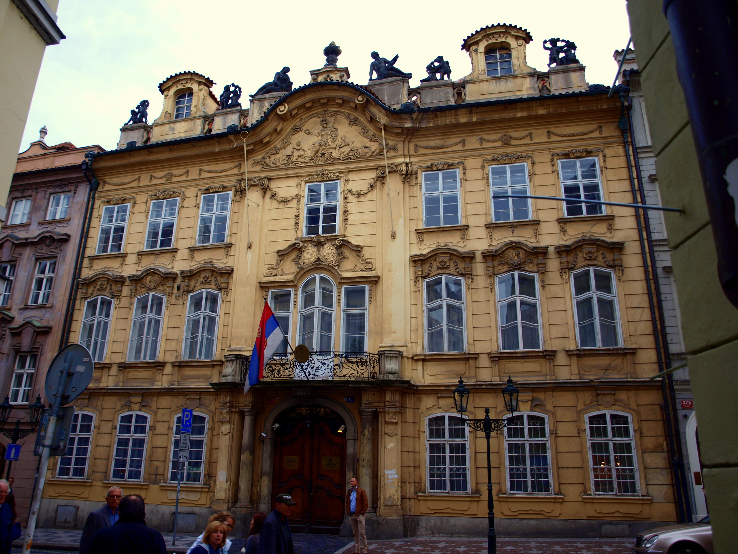 Kaunický palác, Mostecká